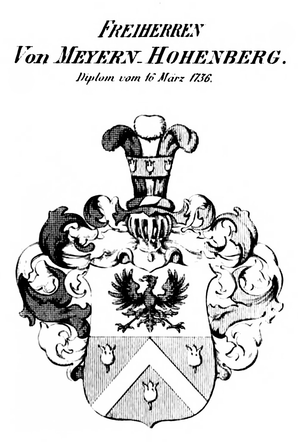 Wappen Meyern Hohenberg - Tyroff AT.jpg